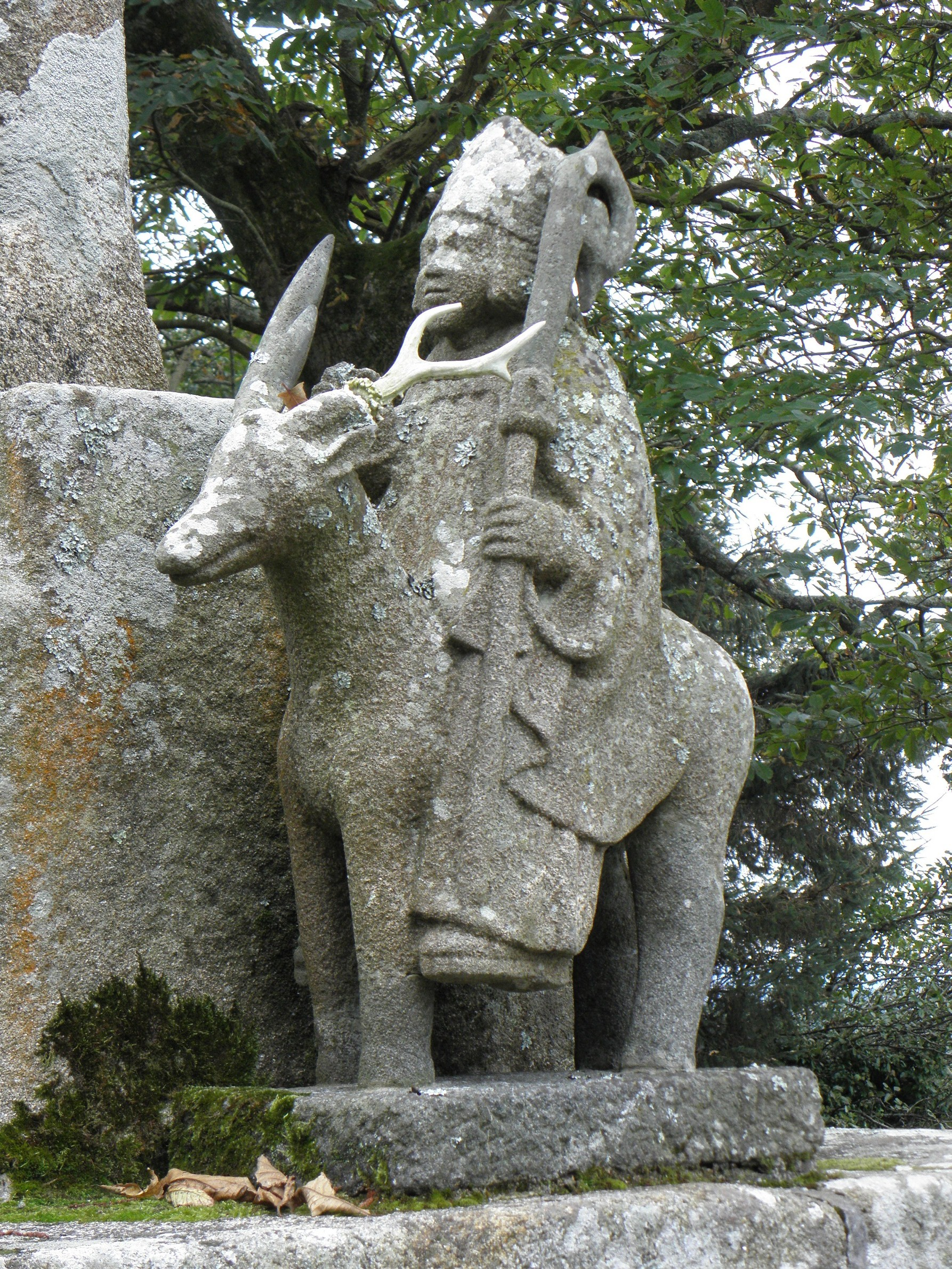 Statue de Saint-Théleau à la base du calvaire de la chapelle Saint-Théleau de Plogonnec (29). .